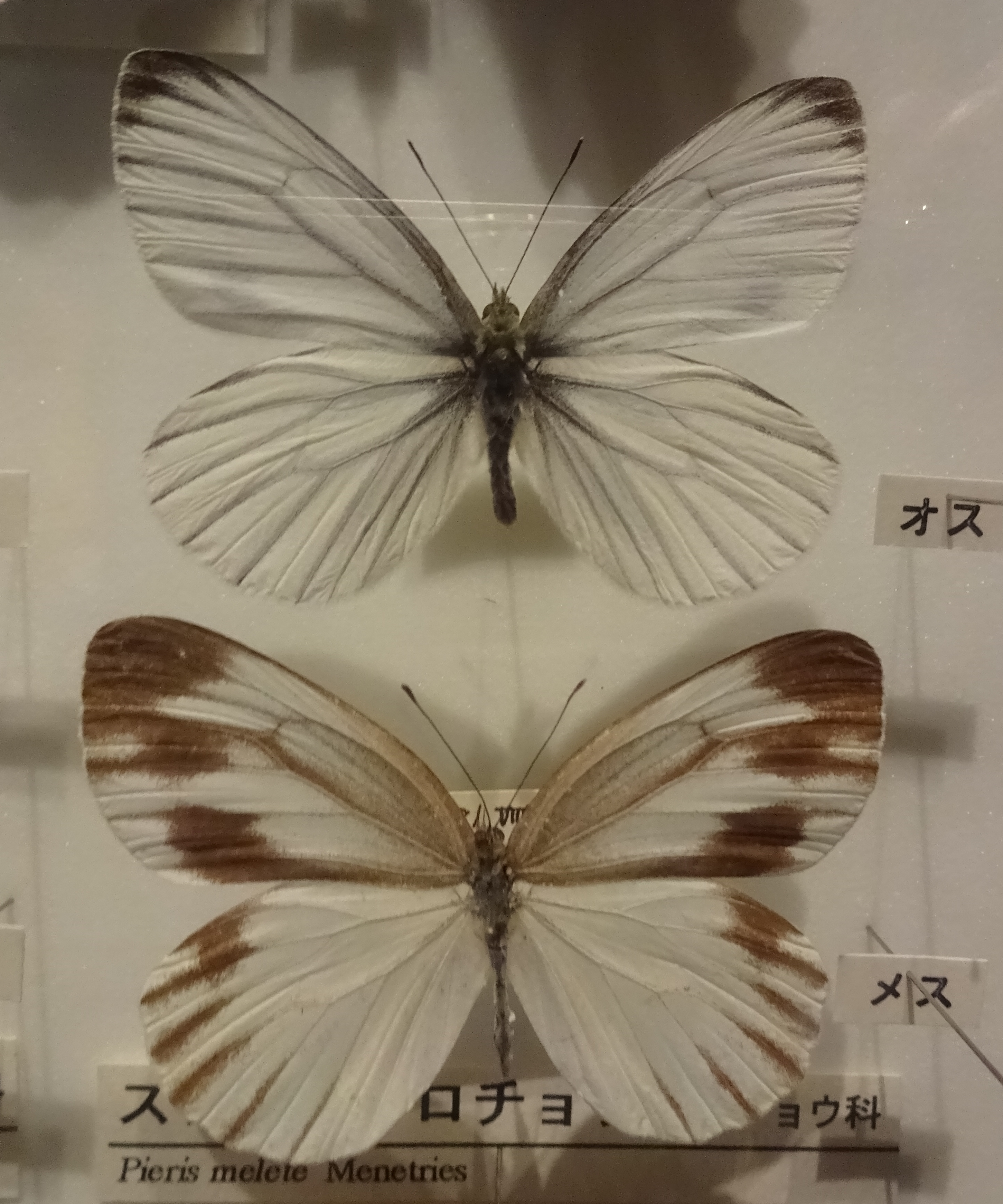 スジグロシロチョウ♂♀